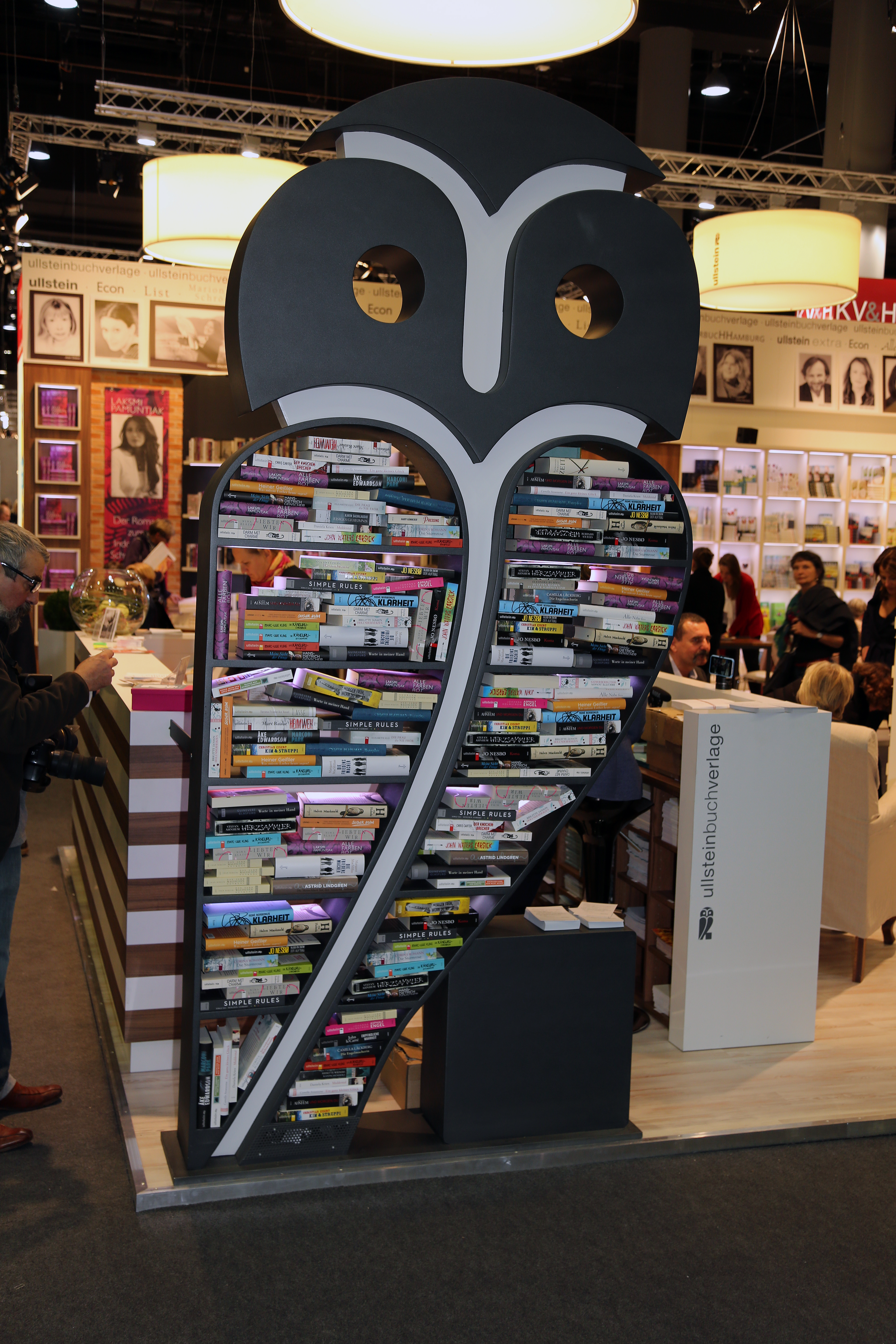 Ullstein Verlag bei der Frankfurter Buchmesse 2015